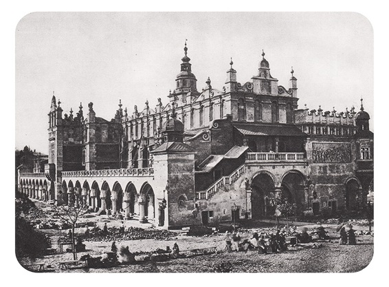 споруда